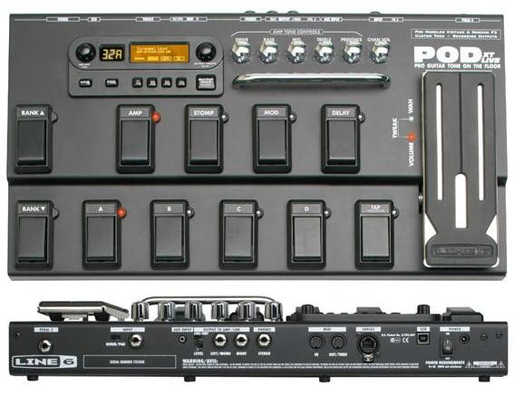 Line 6 POD XT Live רישיון נוצר על ידי משתמש:Stivie